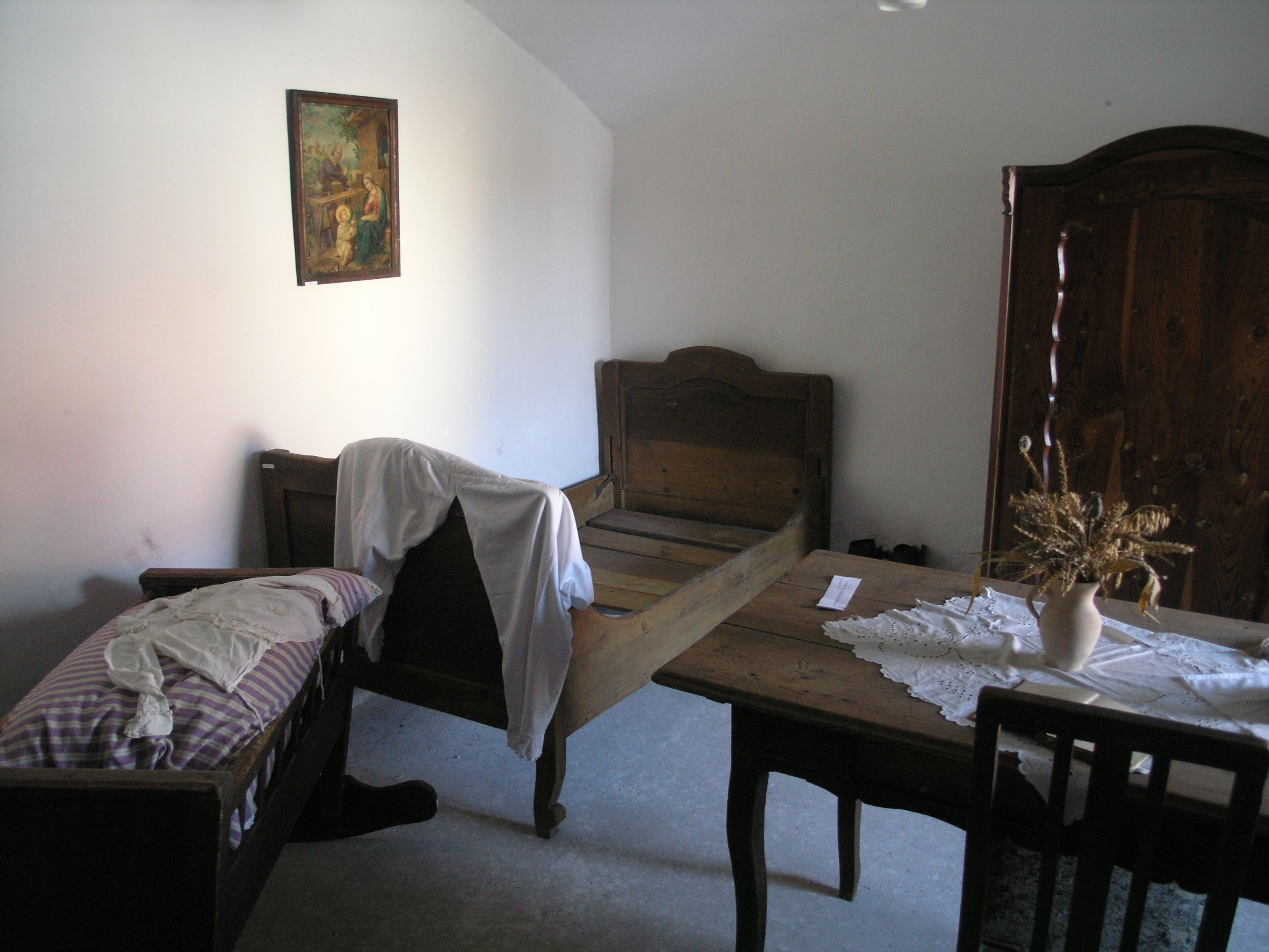 Muzeum venkova Kamberk - interiér